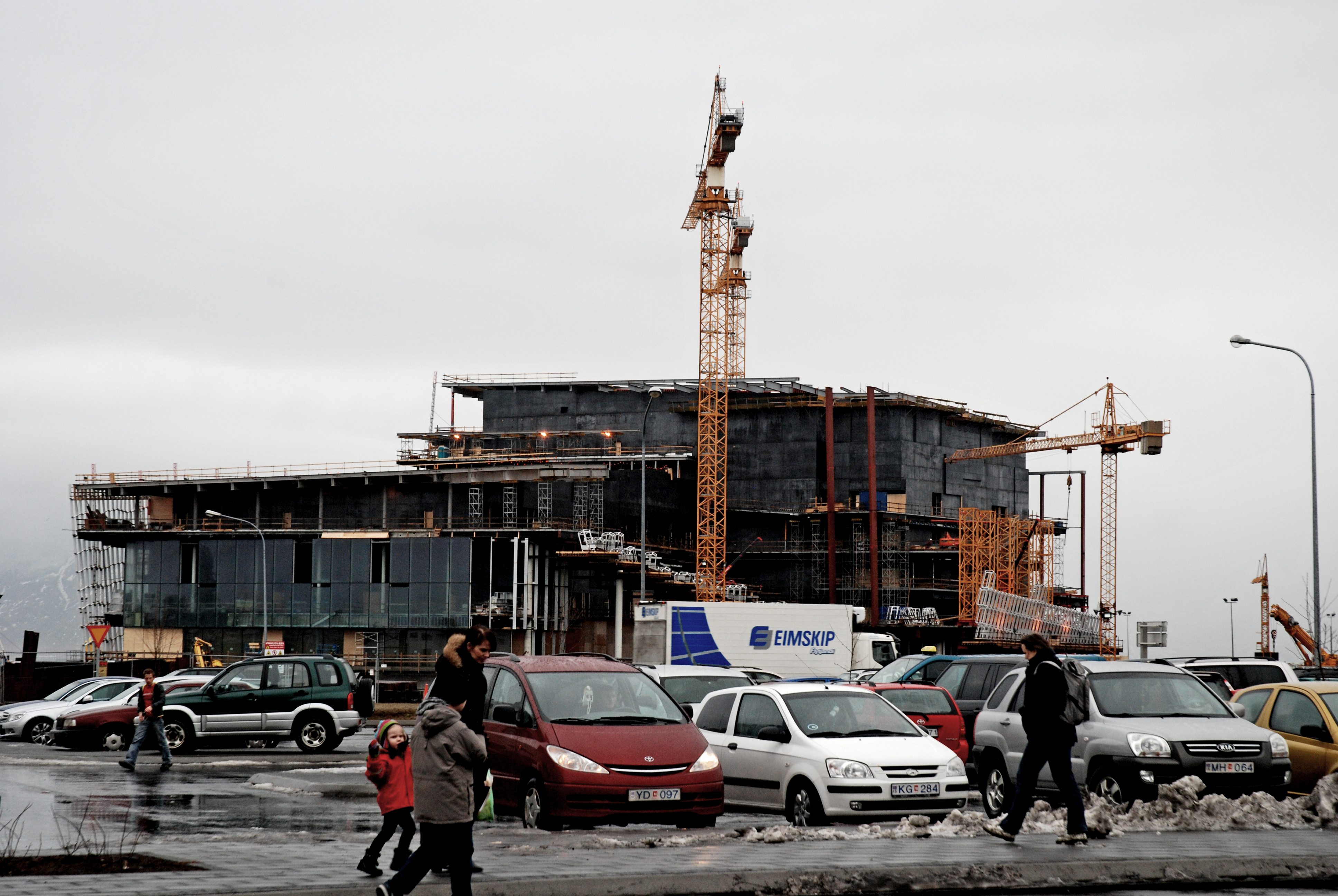 Byggeplads i Reykjavik